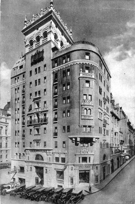 Edificio del Jousten Hotel de Buenos Aires, en la esquina de Corrientes y 25 de Mayo. A su izquierda asoma el Palacio de Correos, pero aún no existía el Edificio Comega.